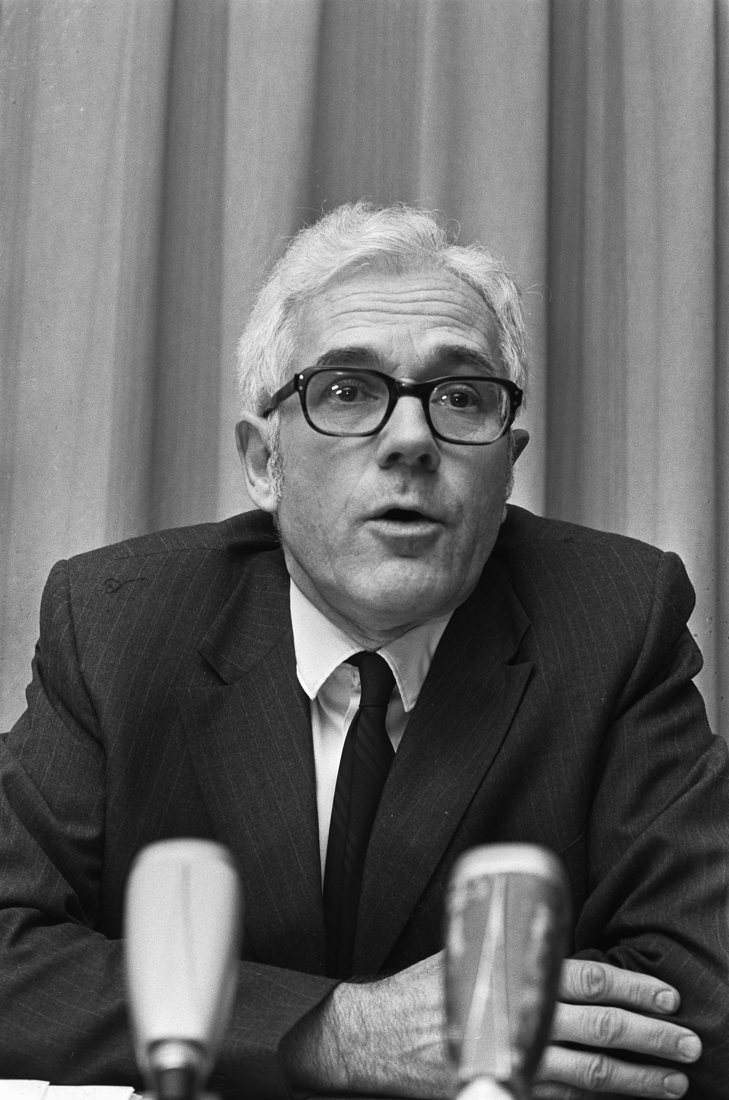 Collectie / Archief : Fotocollectie Anefo Reportage / Serie : [ onbekend ] Beschrijving : Delegatie van Amerikaanse Raad van Kerken spreekt met Nederlandse Kerken over bombardementen in Vietnam, 21 en prof. R. Brown (l) en prof. Harvey Cox , 23 en 24 Datum : 9 januari 1973 Trefwoorden : BOMBARDEMENTEN, KERKEN, delegaties Instellingsnaam : Raad van Kerken in Nederland Fotograaf : Croes, Rob C. / Anefo Auteursrechthebbende : Nationaal Archief Materiaalsoort : Negatief (zwart/wit) Nummer archiefinventaris : bekijk toegang 2.24.01.05 Bestanddeelnummer : 926-1453